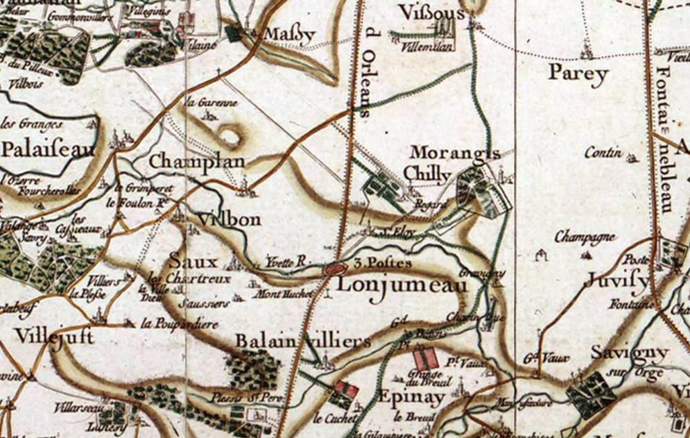 Carte de la région de Chilly-Mazarin (91) au XVIIe siècle par Cassini.